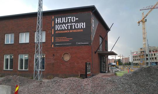 Jätkäsaaren infokeskus Huutokonttori Tyynenmerenkatu 1 00220 Helsinki